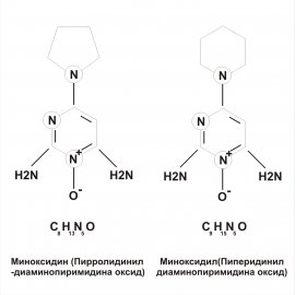 Сравнительная схема молекул миноксидина и миноксидила